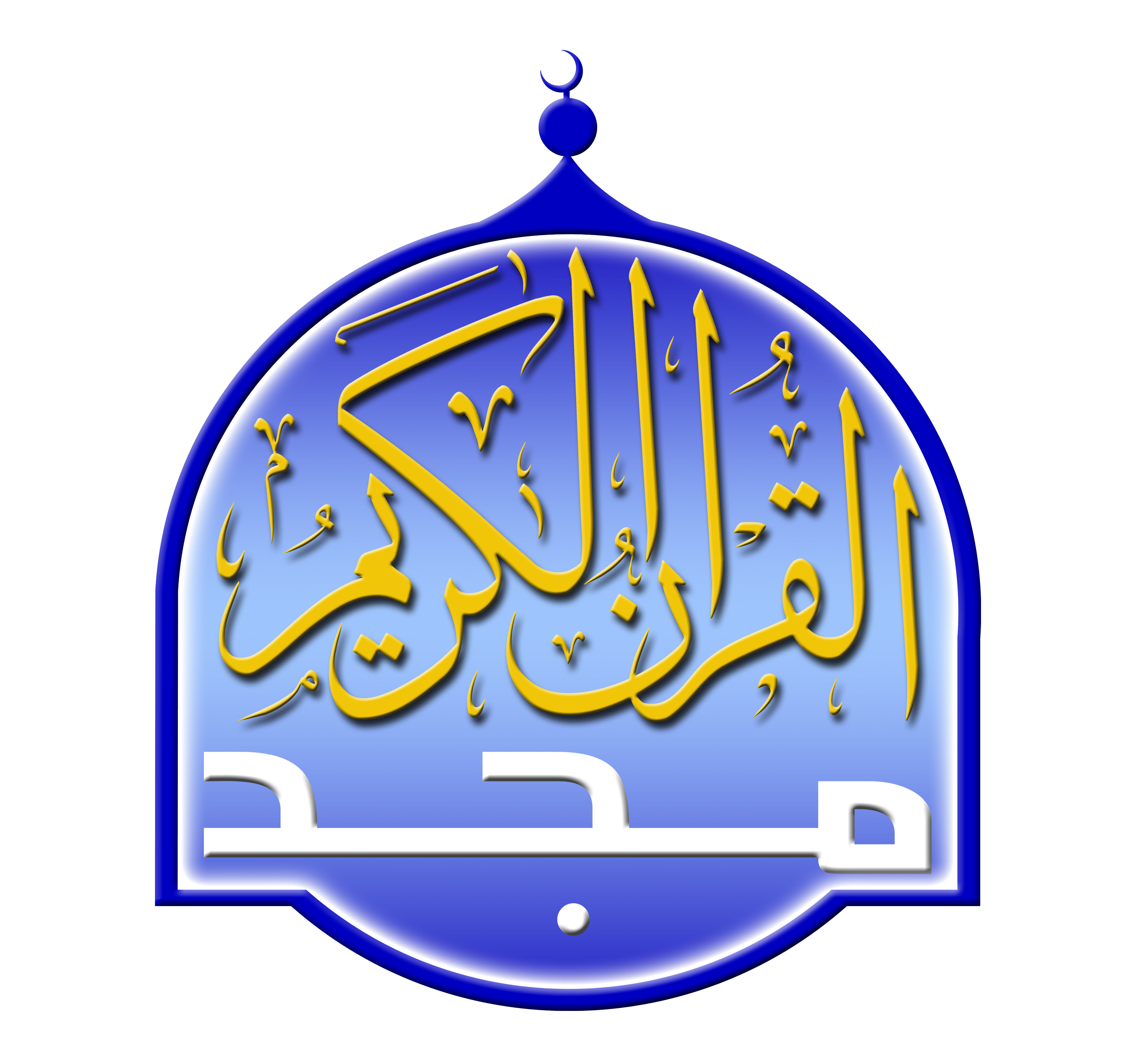 شعار المجد للقرآن الكريم